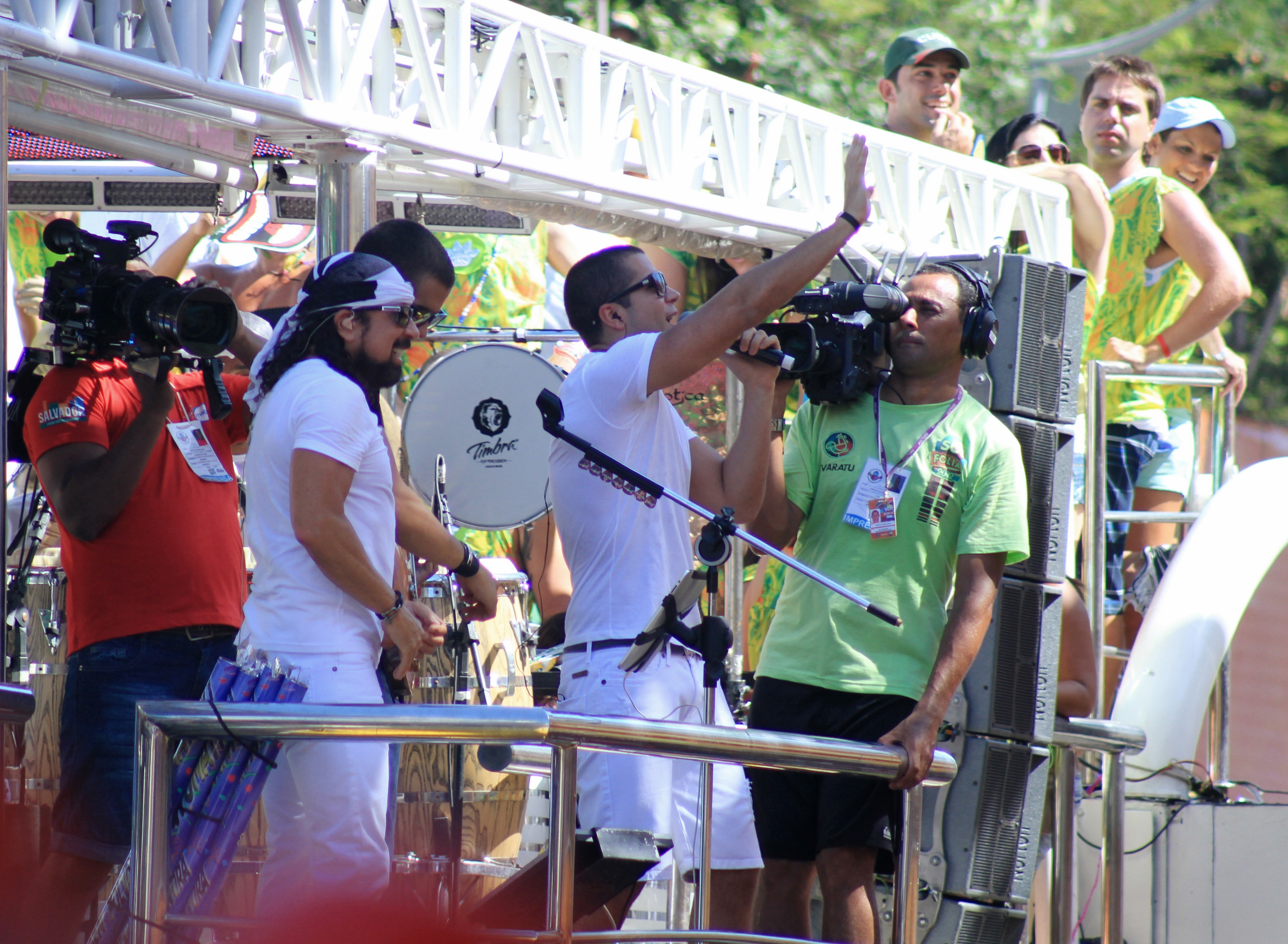 Oito7Nove4 e Chiclete com Banana no Bloco Camaleão no Circuito Osmar em (21/02). Foto: Flora Rodriguez - Setur